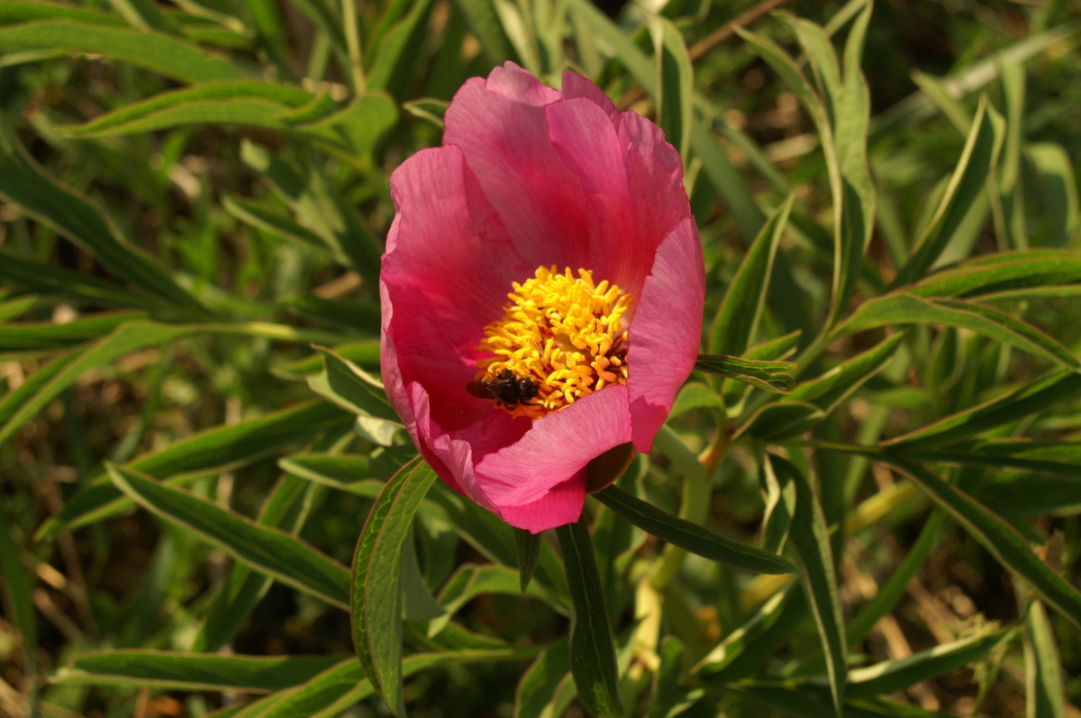 Paeonia arietina